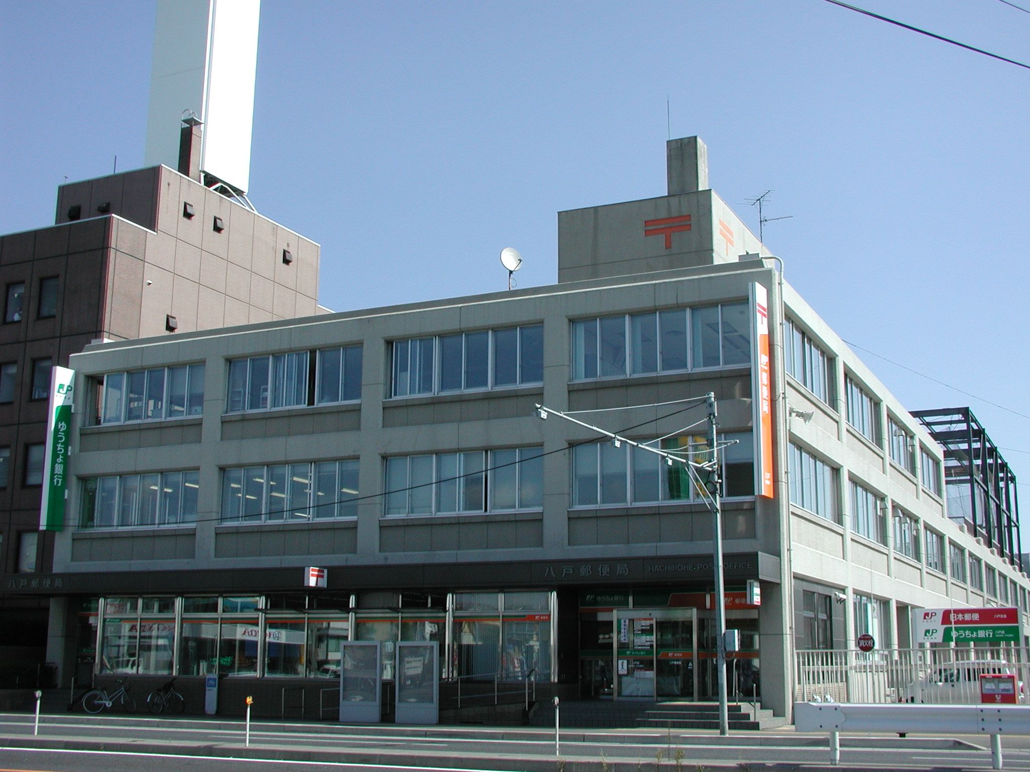 青森県八戸郵便局、郵便事業八戸支店・ゆうちょ銀行八戸店（仙台支店八戸出張所）併設。